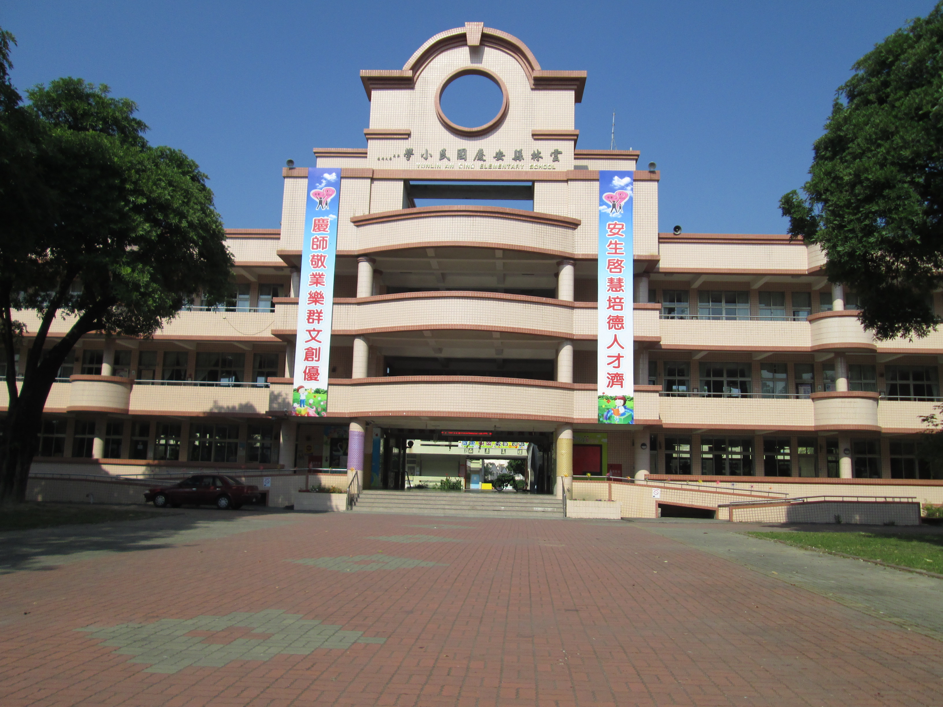 雲林縣虎尾鎮安慶國民小學